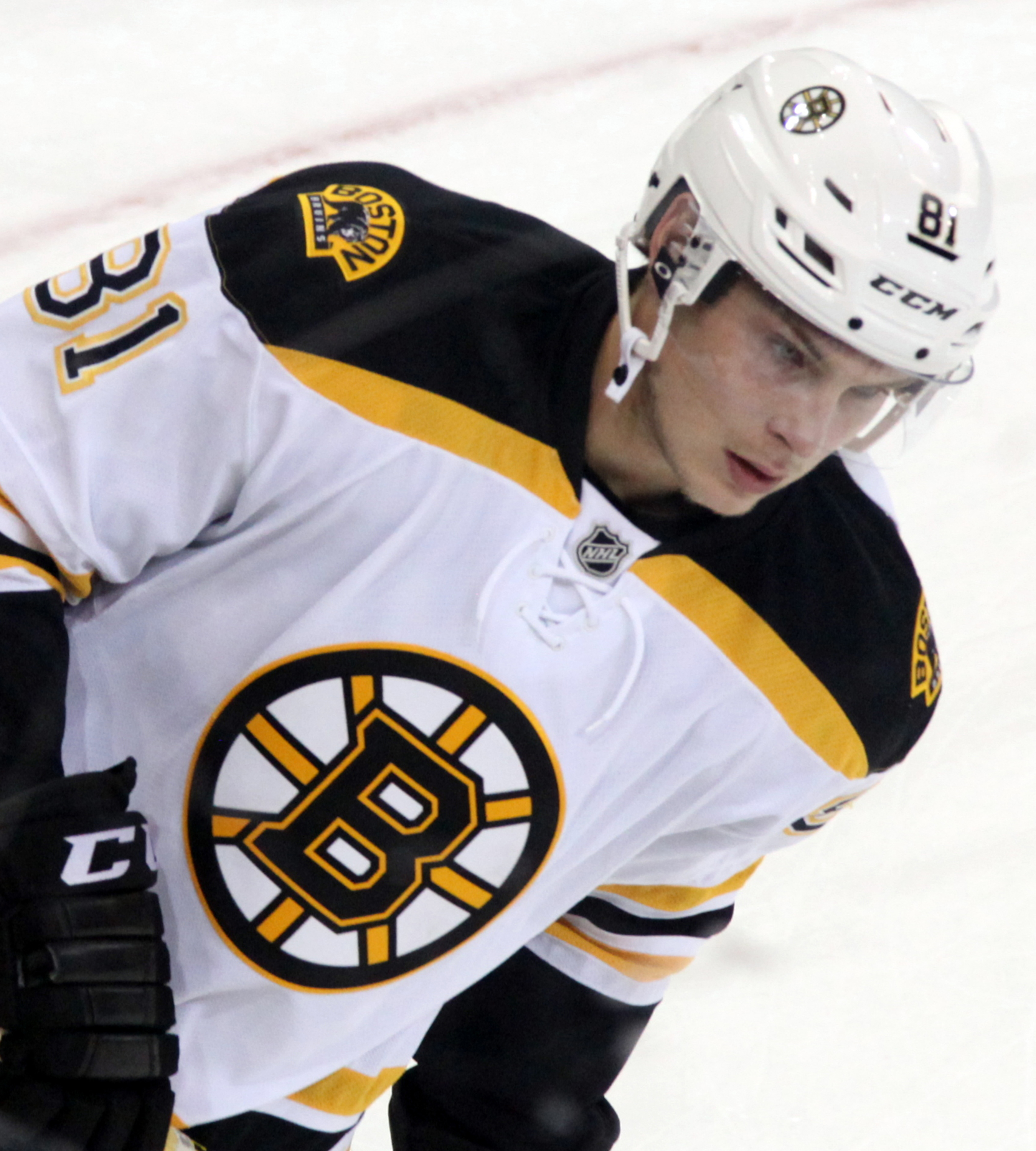 Blidh in September 2015.